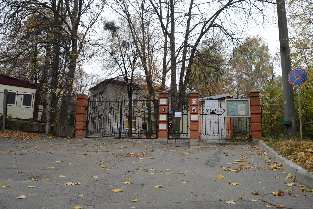 Lycée Français AEFE Anne de Kiev, V Lypynskogo 21, Kyiv